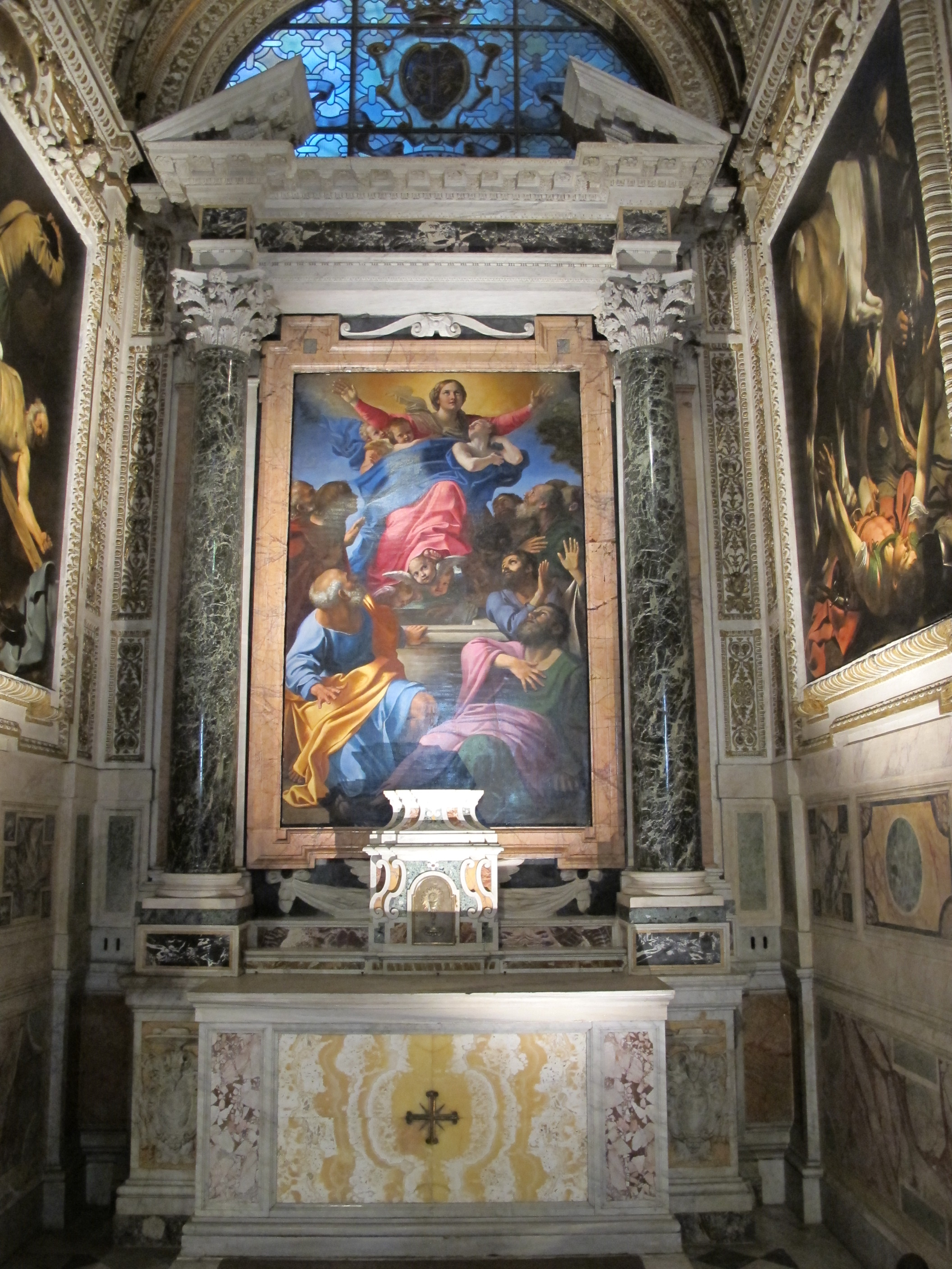 Cappella cerasi, annibale carracci, assunzione della vergine, 1601